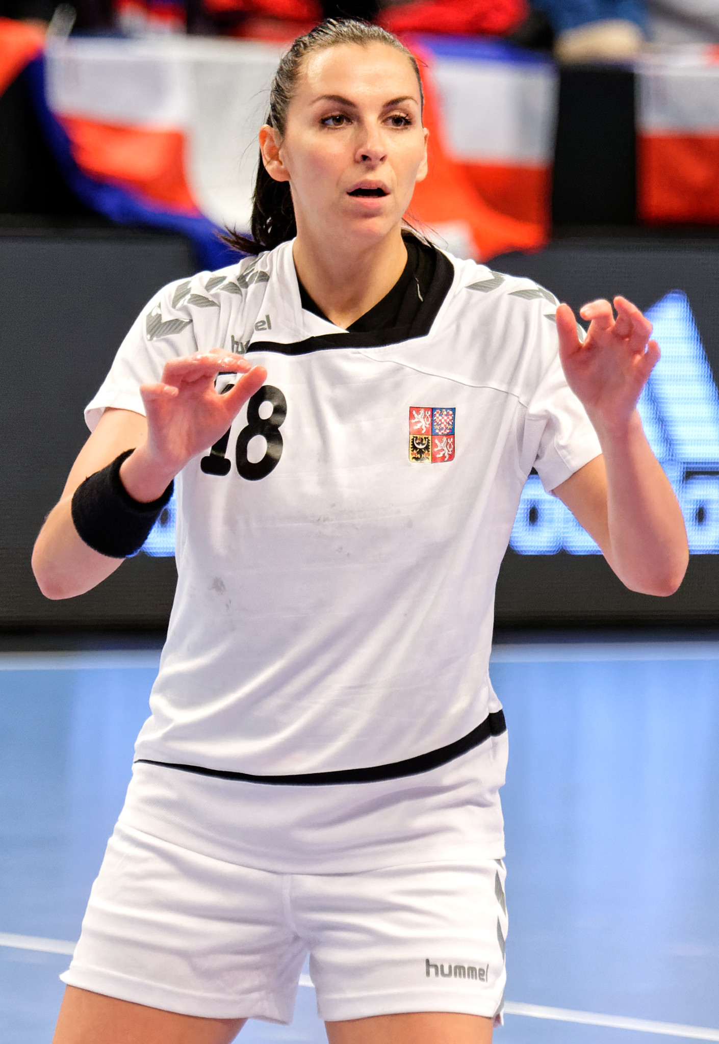 Iveta Luzumová lors du match France - République Tchèque pour le compte du TIPIFF 2015. A Coubertin, le 29 novembre 2015.